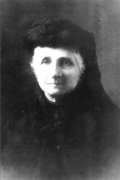 Беларуская (тарашкевіца): Партрэт Марыі Магдалены Радзівіл (Maryja Magdalena Radzivił) з роду Завішаў гербу «Лебедзь» (1861 — 1945), дзяячкі беларускага культурнага руху, мэцэнаткі.